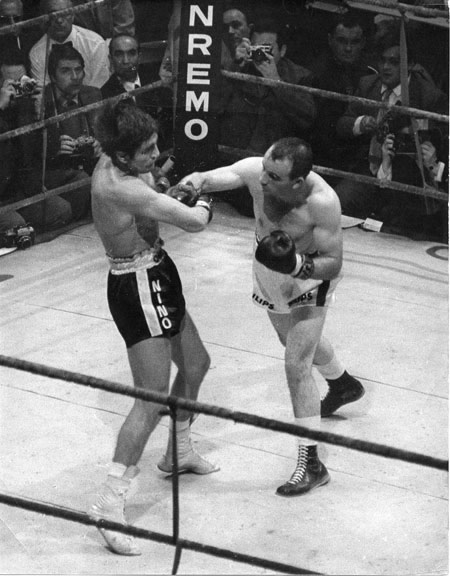 Nino Benvenuti vs. Don Fullmer in San Remo